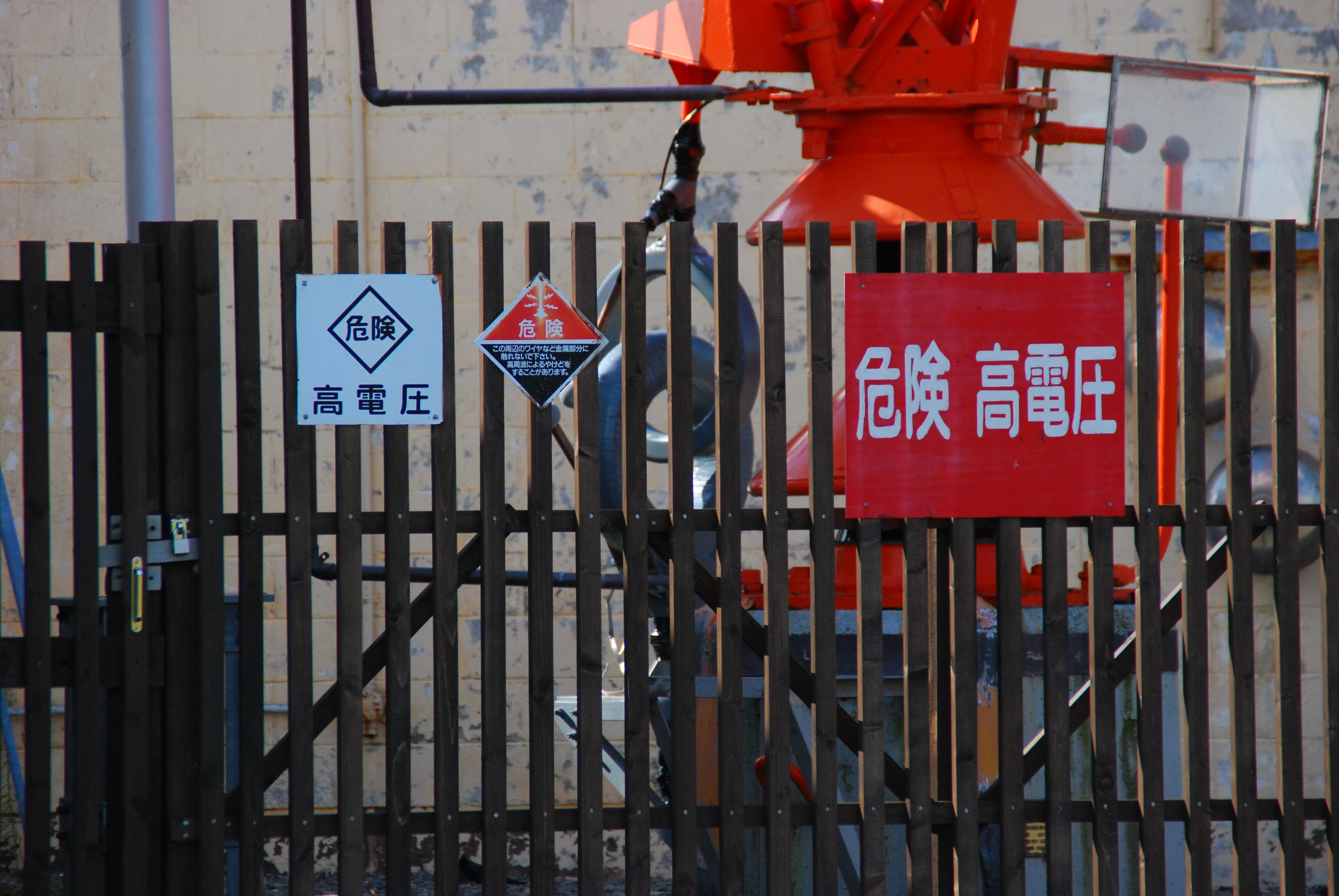 十勝太ロランC送信所の空中線下部のオースチントランス